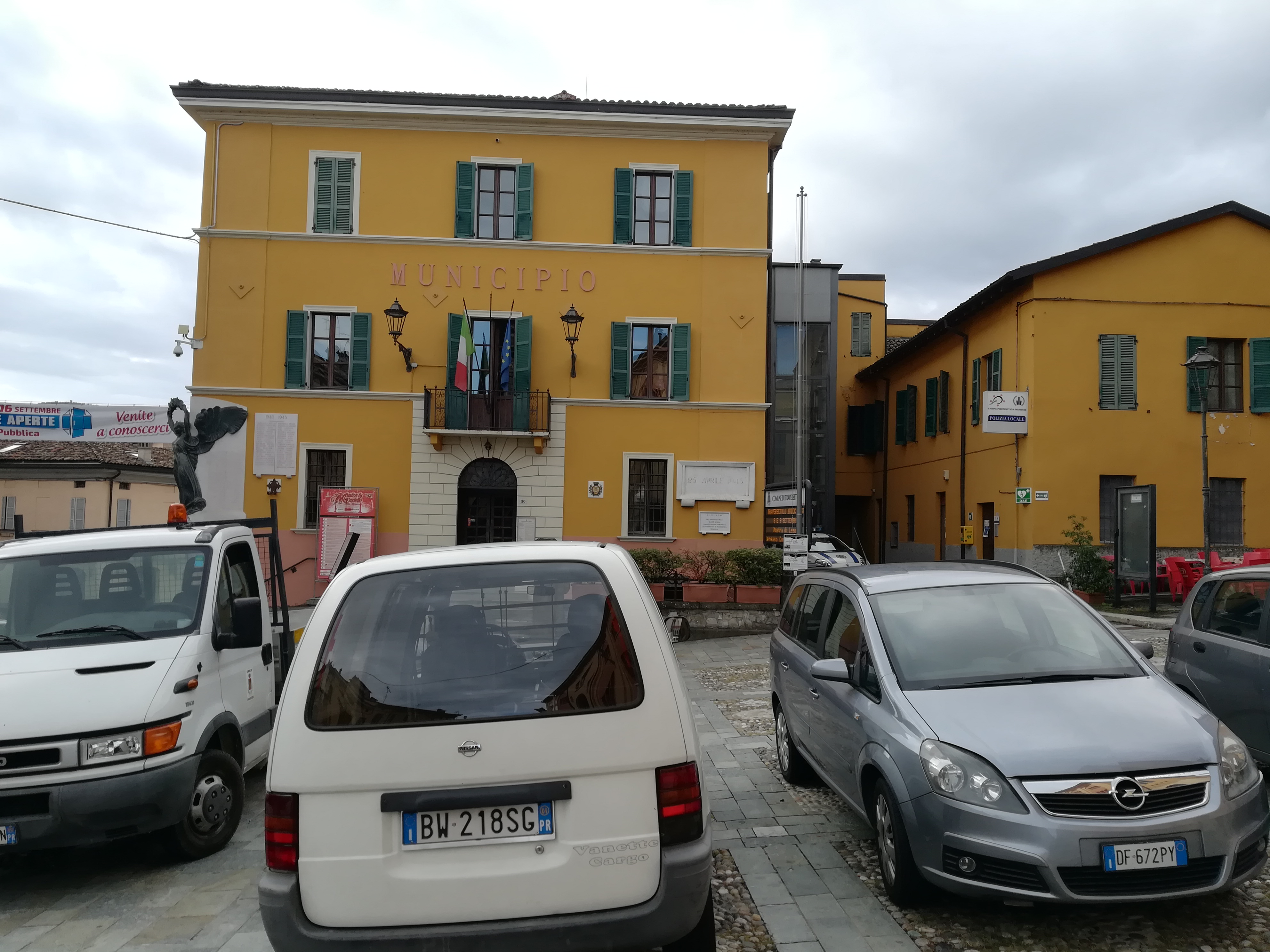 Traversetolo